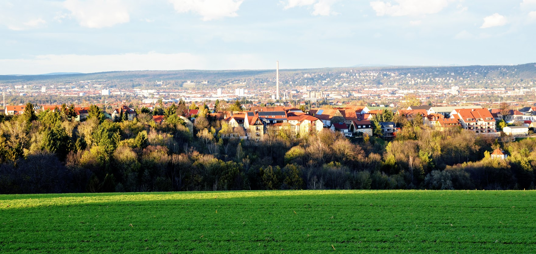 Goppeln